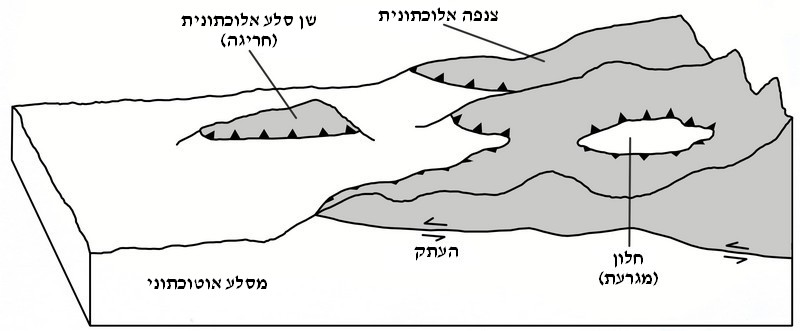 Bestandteile eines Überschiebungssystems: Klippe, Fenster, Decke, Überschiebung